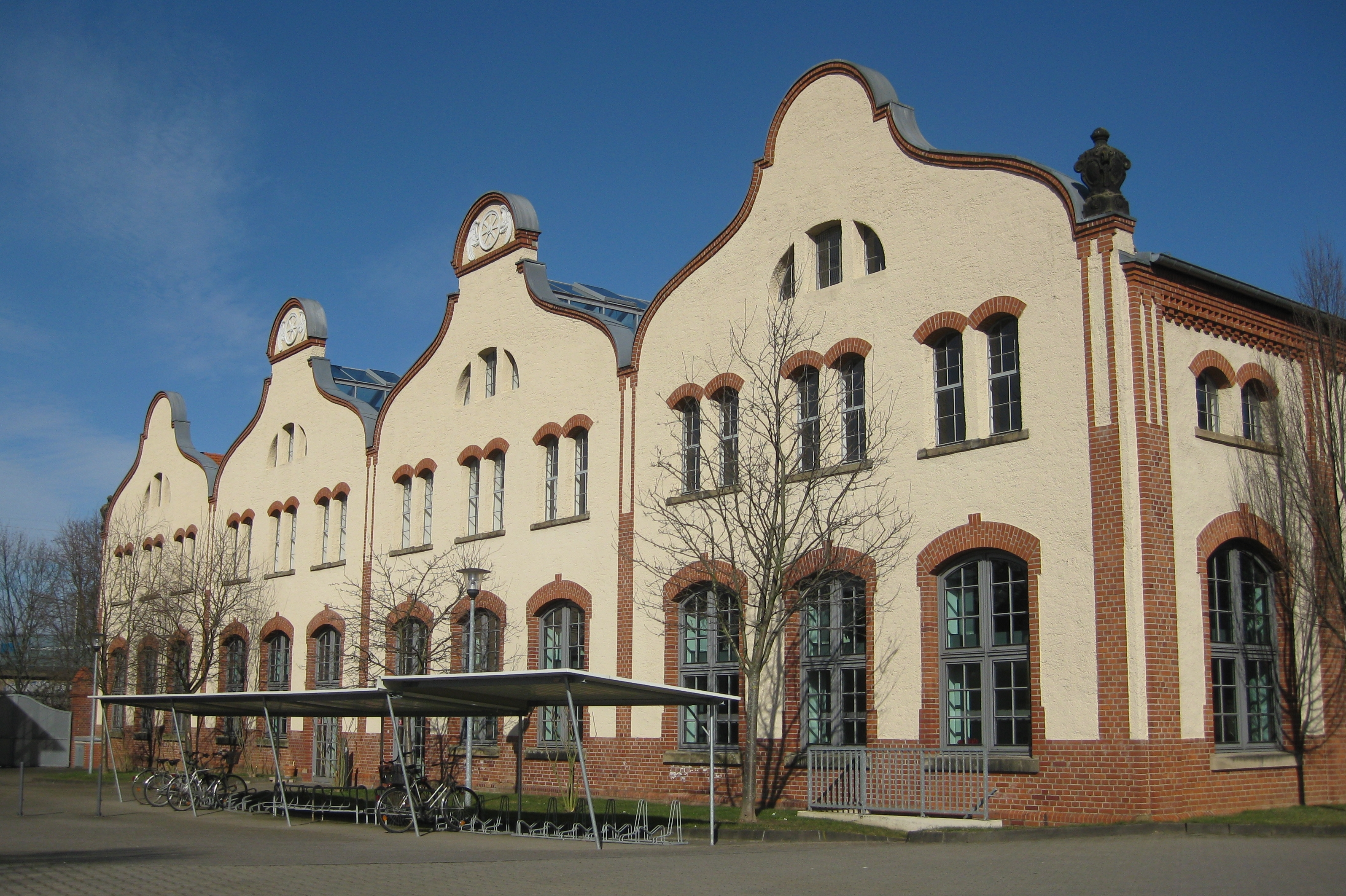 Deutschland, Bonn, Graurheindorfer Str. 157: Bonner Sitz der Kultusministerkonferenz (KMK) im ehemaligen Straßenbahndepot; Rückansicht.